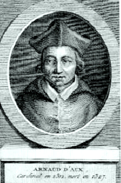 Cardinal Arnaud d'Aux